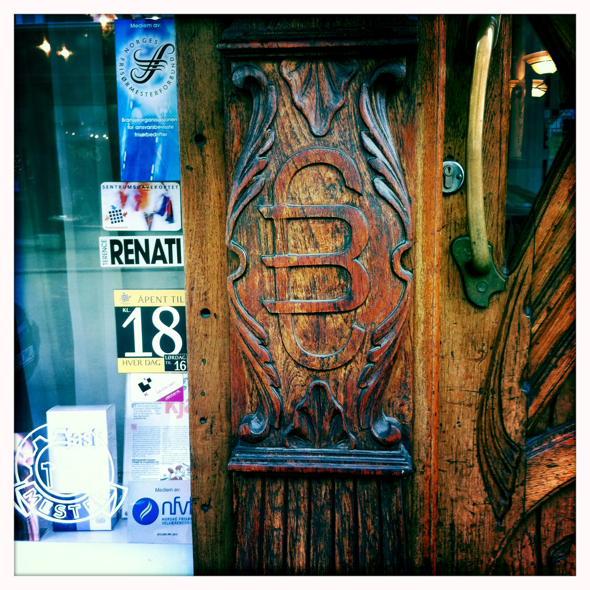 Camillo Bastrup dør og våpenskjold